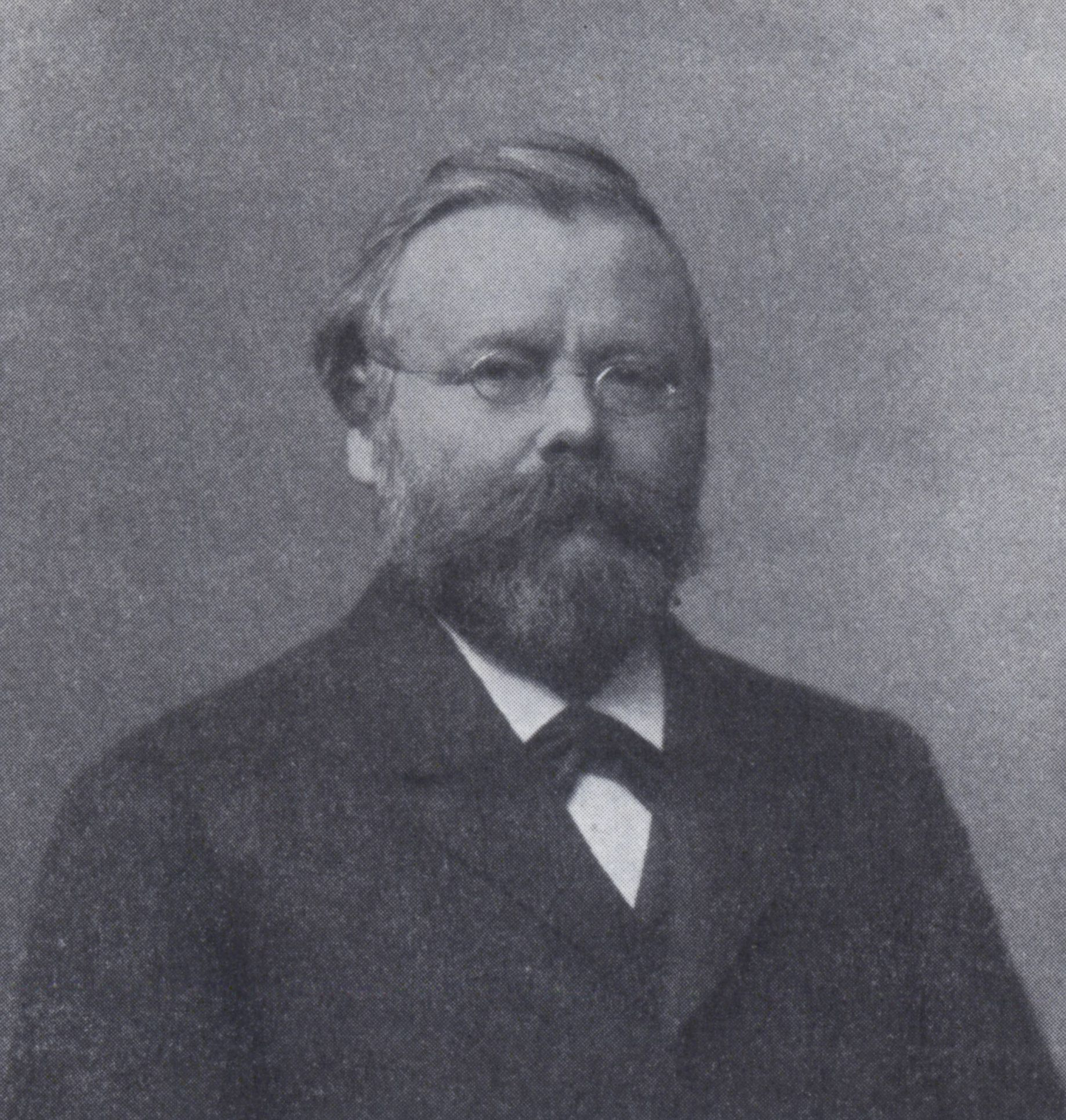 Porträtfoto von William Lewis Hertslet